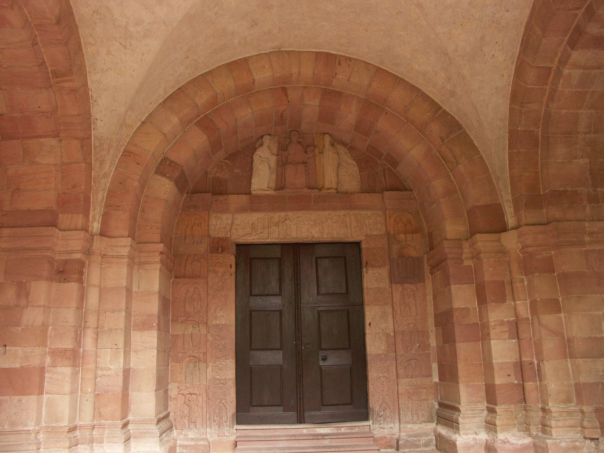 Andlau (Bas-Rhin) Eglise St.-Pierre-et- St-.Paul Porte ouest